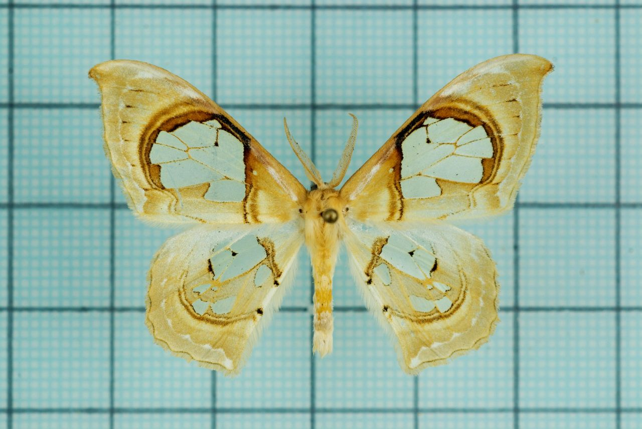 Macrauzata fenestraria insulata Inoue, 1988 台灣窗翅鉤蛾 鞍2:P35,Pl.38-18 male